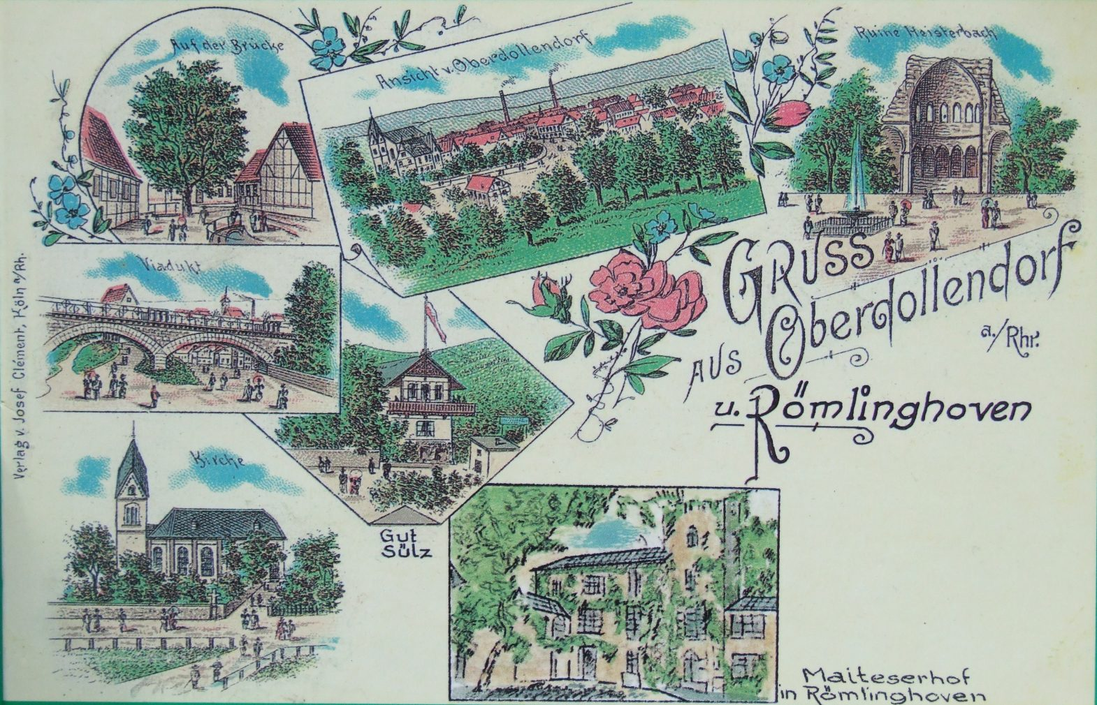 oben links: ehemalige, über 600 Jahre alte Linde an der Kreuzung von Bach-, Falltor- und Lindenstraße; Mitte links:ehemaliges Viadukt der ehemaligen Heisterbacher Talbahn; unten links:Sankt Laurentius; Mitte : Weinhaus Gut Sülz; oben rechts Ruine Heisterbach